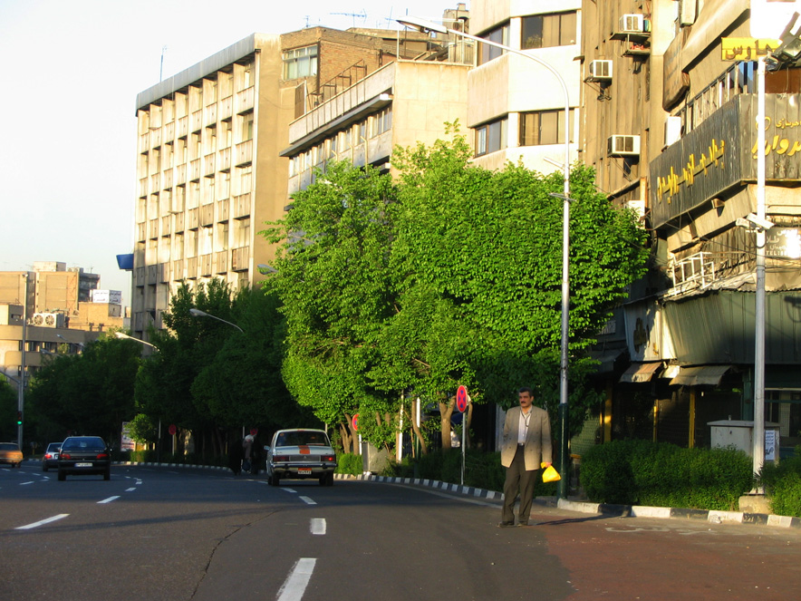 Behjat Abad, Tehran, Tehran, Iran